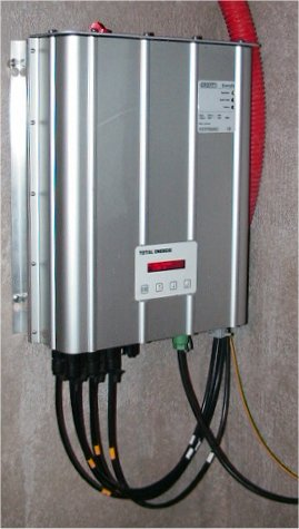 onduleur Total-Energie pour centrale photovoltaïque puissance 2kWc